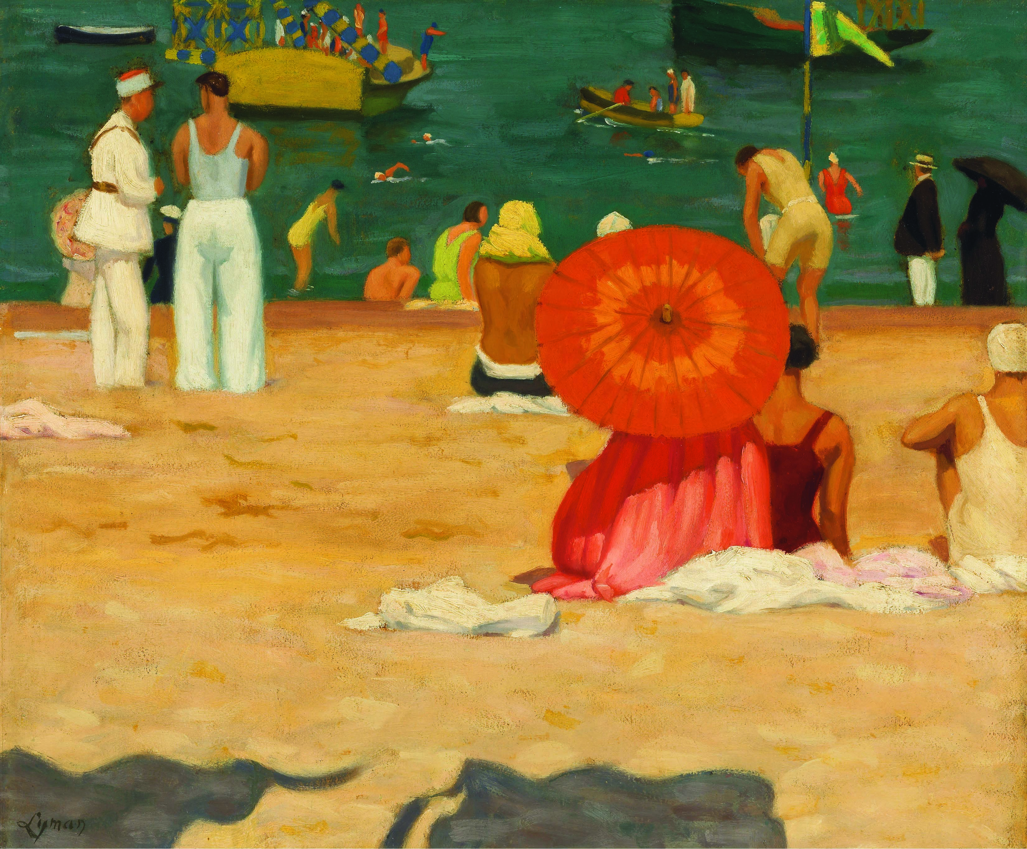 John Lyman (1886-1967), À la plage (Saint-Jean-de-Luz). Huile sur papier collé sur toile, 45,6 x 55,5 x 2,4 cm. Musée des beaux-arts du Canada, Ottawa.